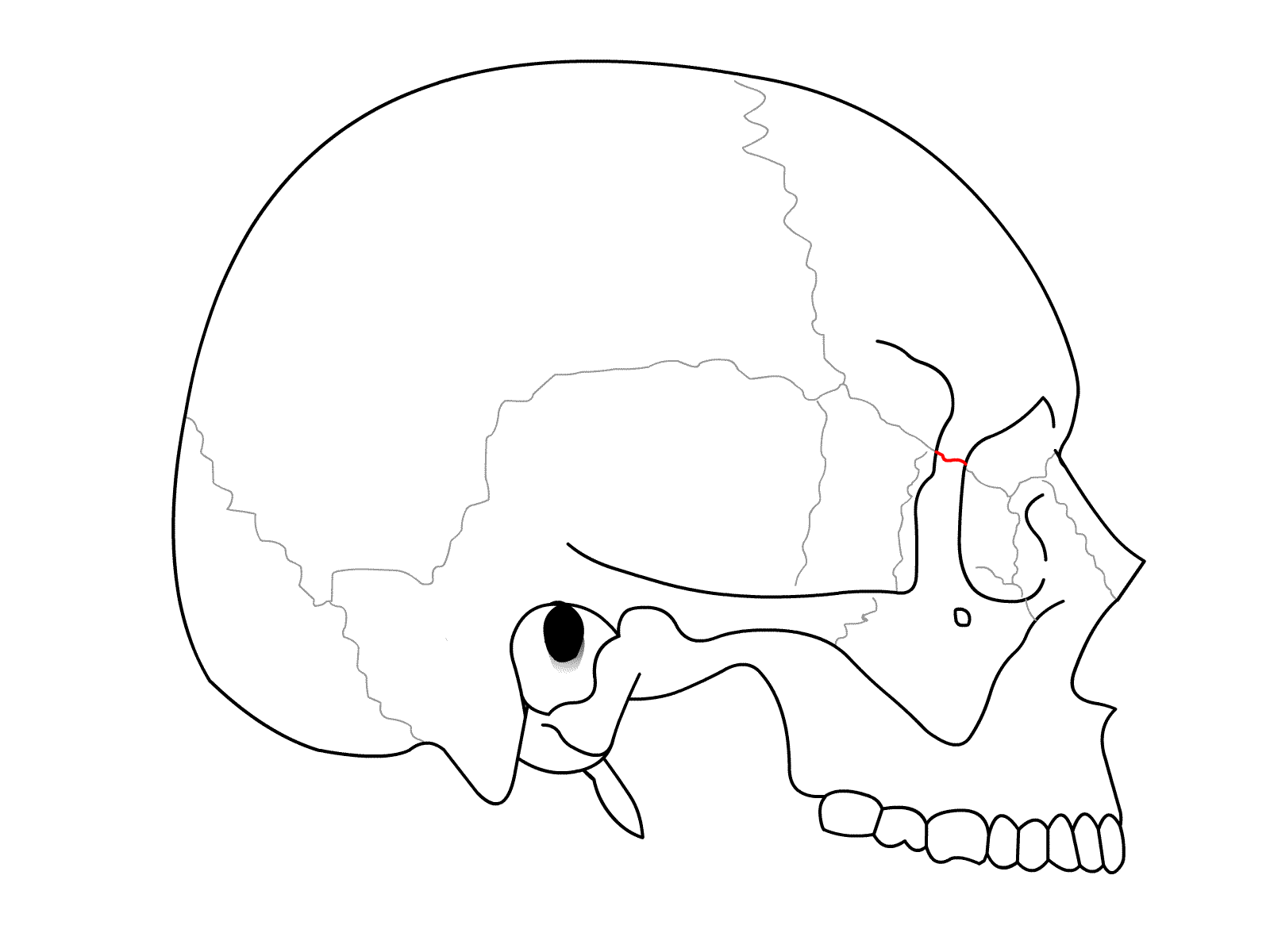 Schädel seitlich - Sutura